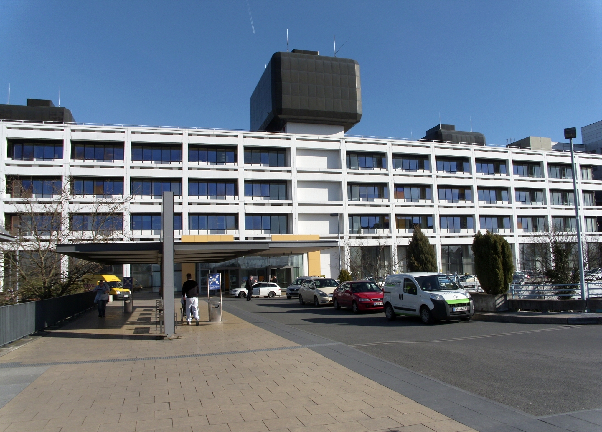 Blick auf den Haupteingang der Universitätsmedizin Göttingen